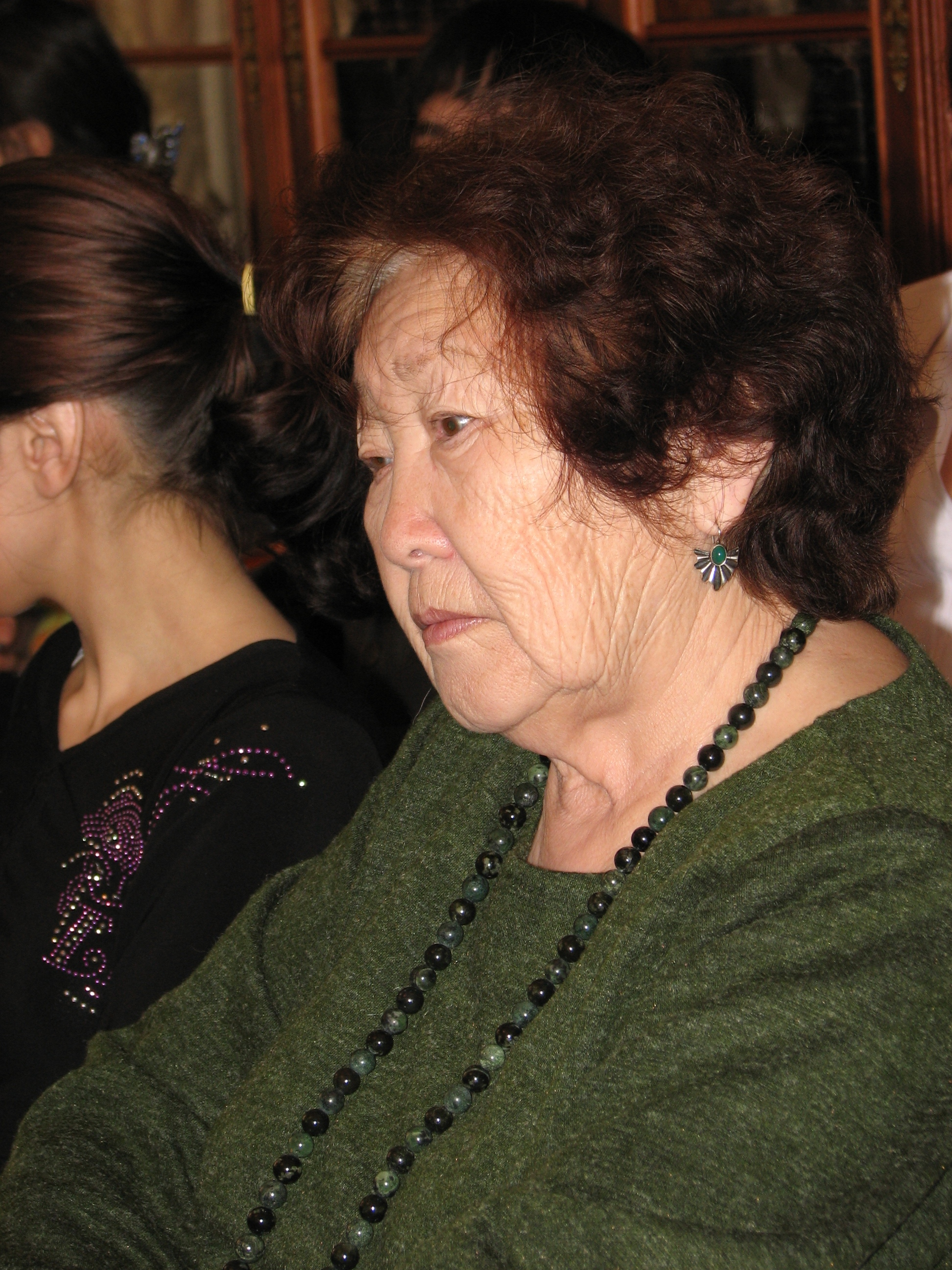 Саха тыла: Филологическай наука кандидата Сардаана Платоновна Ойунская Национальнай библиотекаҕа түспүт хаартыската